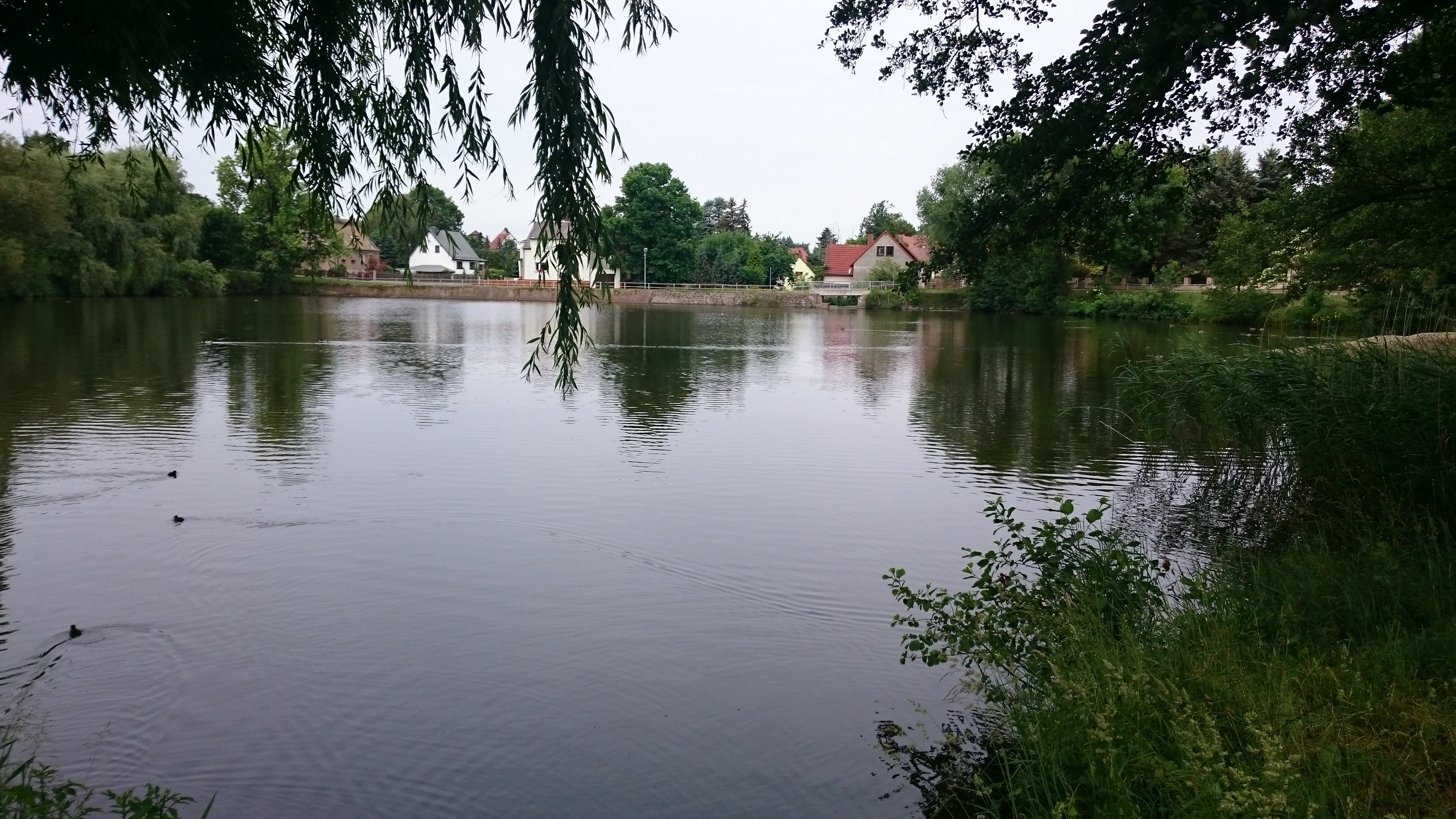 Der Oberfürstenteich in Geithain, gespeist durch die Eula.